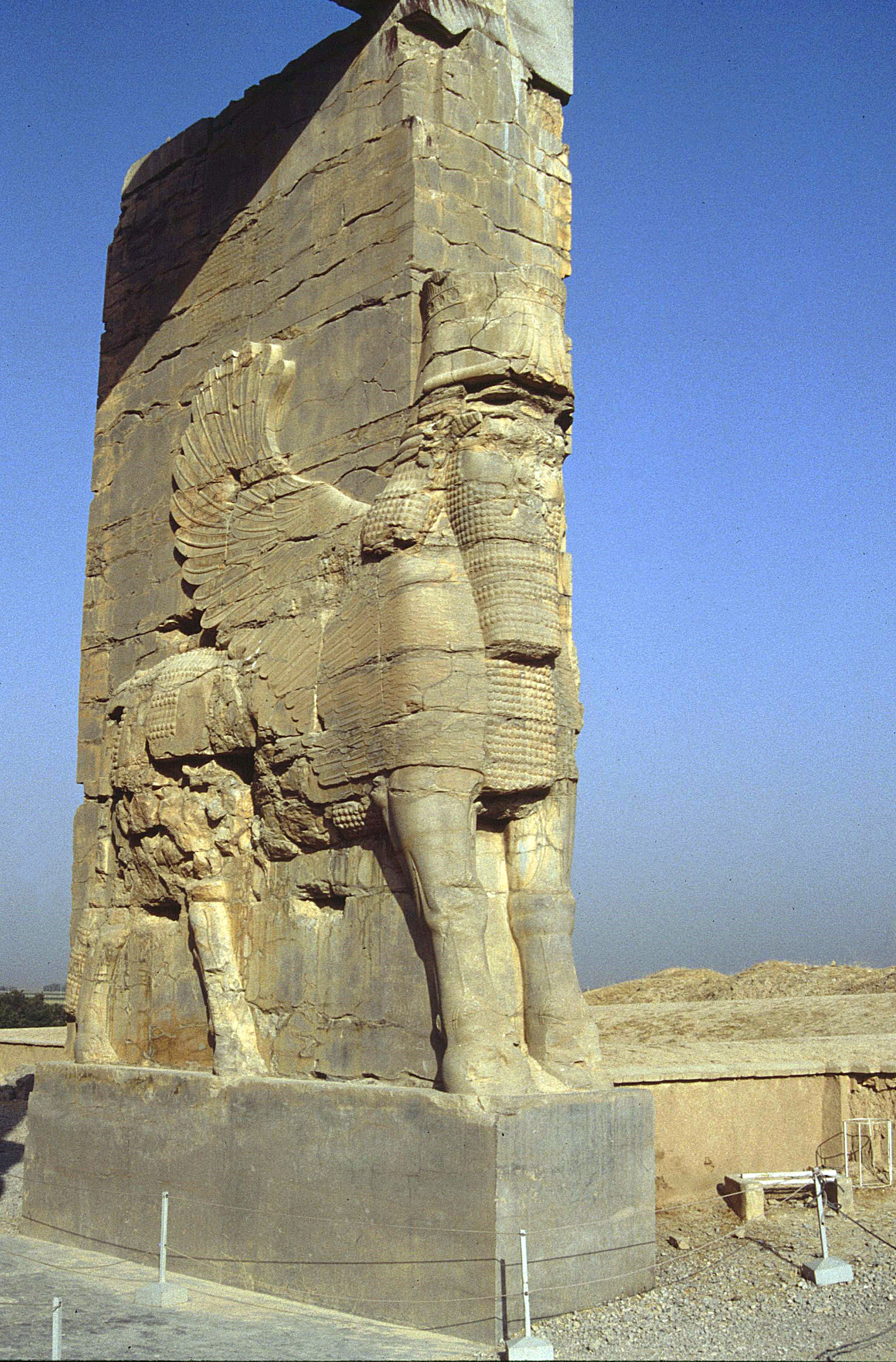 Persepolis: Xerxes-Tor